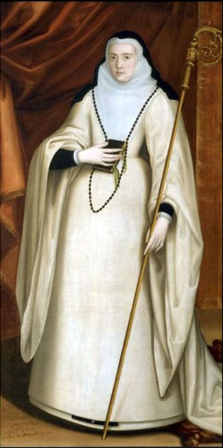 Retrato de María Ana de Austria (1568-1629), que era hija ilegítima de Don Juan de Austria (hijo ilegítimo a su vez del emperador Carlos I de España), y que llegó a ser abadesa del monasterio de las Huelgas de Burgos, donde está enterrada.